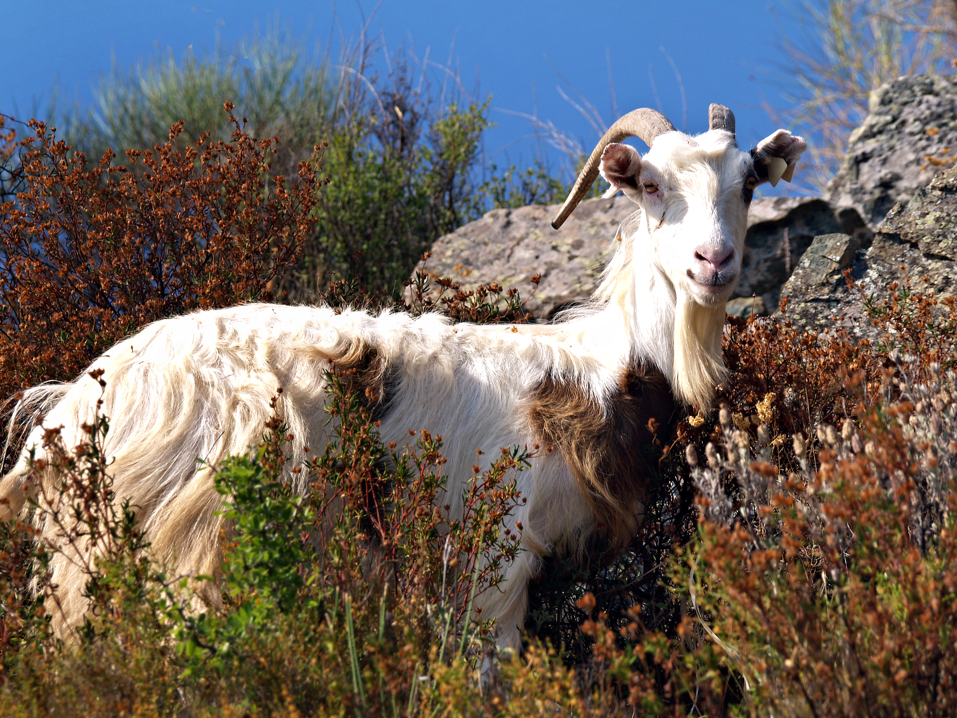 Altiani, Bozio (Corse) - Chèvre d'un troupeau dans le maquis